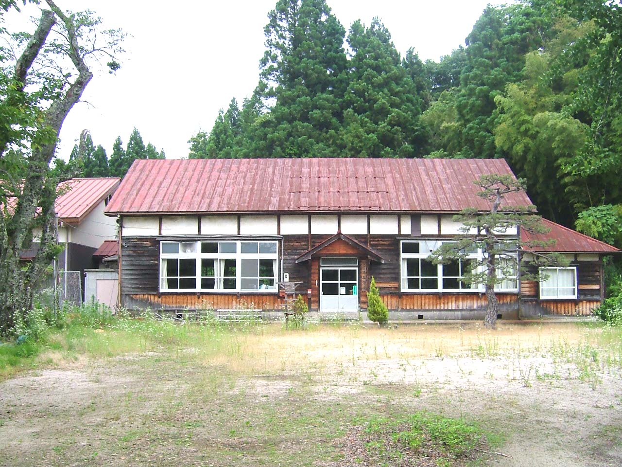 伯耆町立日光小学校添谷分校